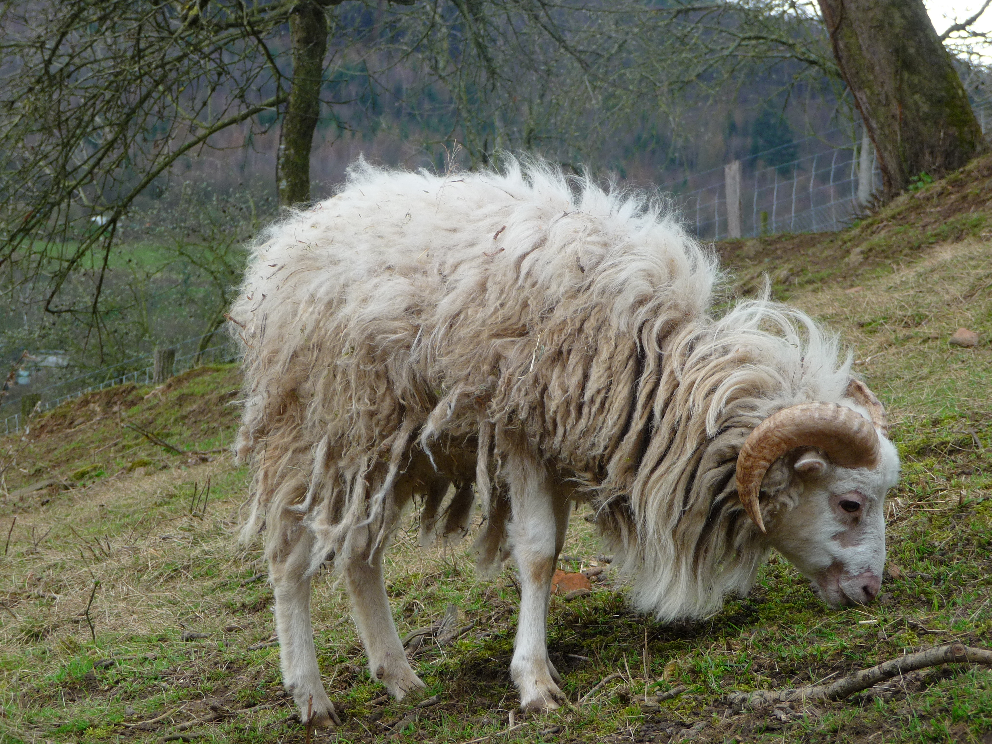 Weidendes Ouessant-Schaf(Ushant), fotografiert im Heidelberger Stadtteil Ziegelhausen (Baden-Württemberg, Deutschland)